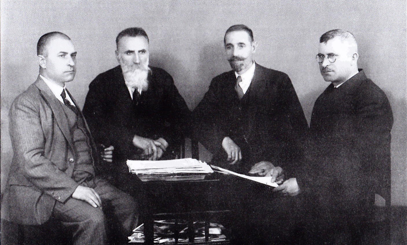 Ilinden organisation members